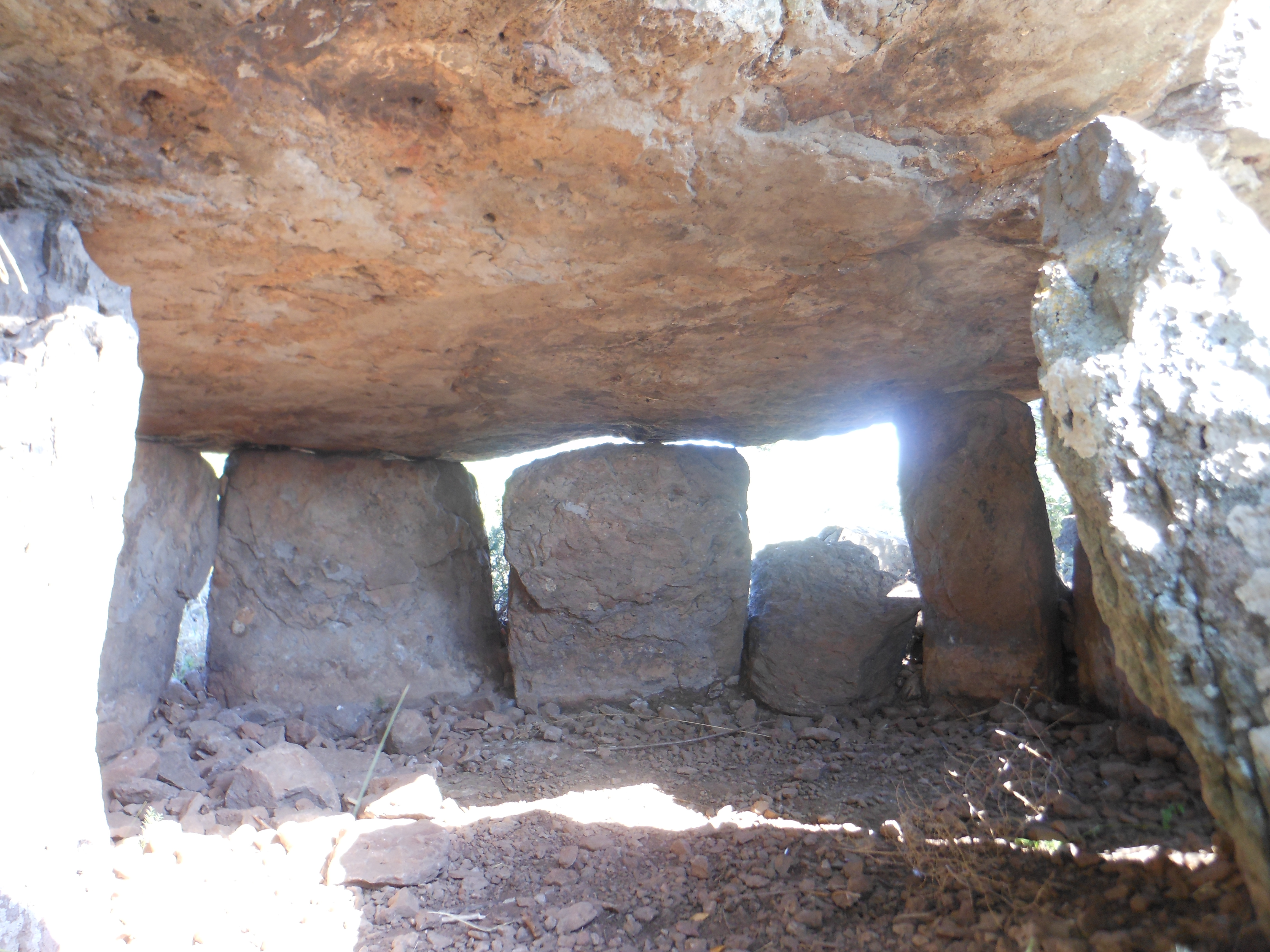 Dorgali - Dolmen di Motorra